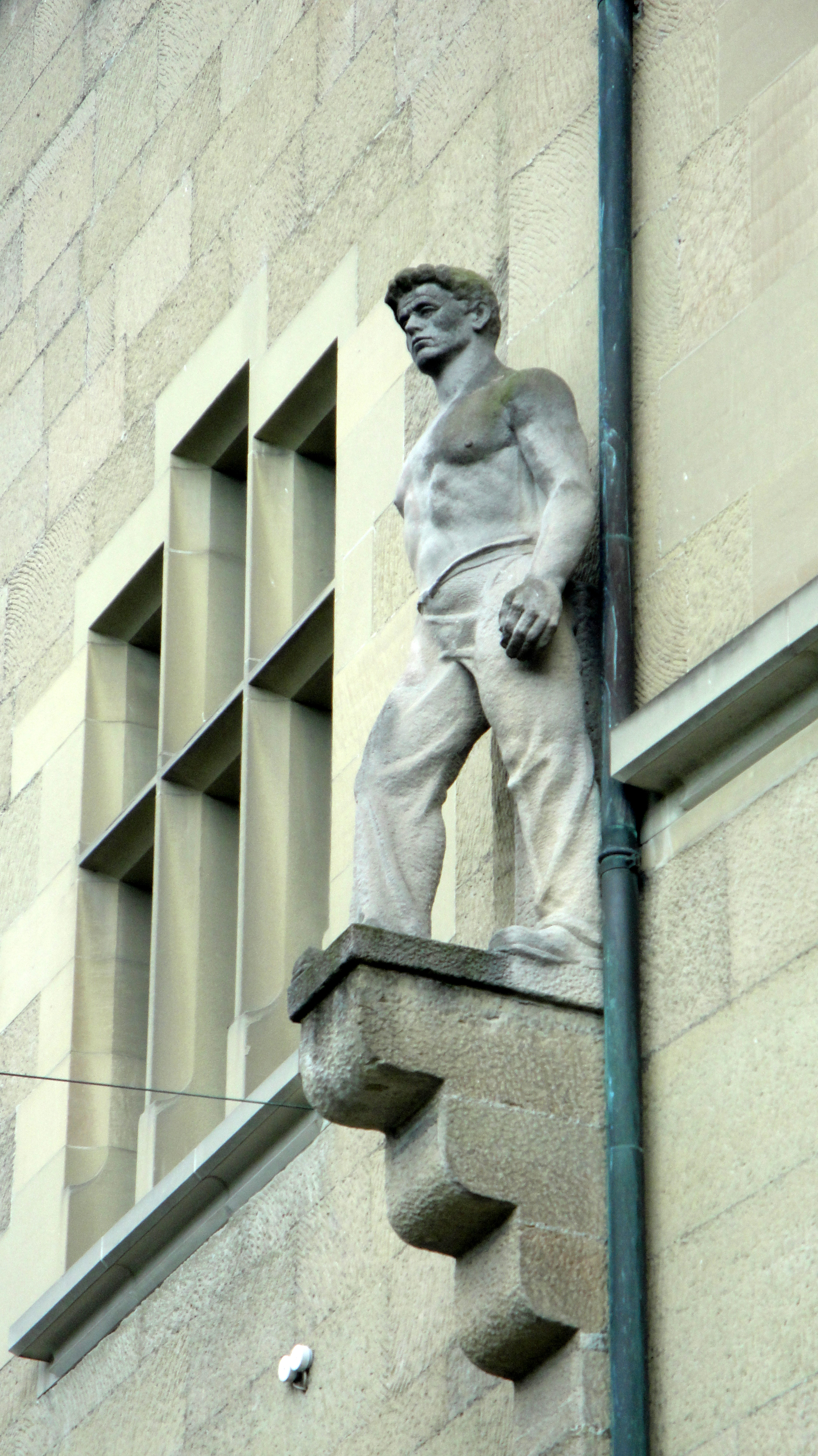 Bern, Rathaus mit Sandsteinstatue Bauarbeiter (Karl Schenk 1942) an der Nordfassade